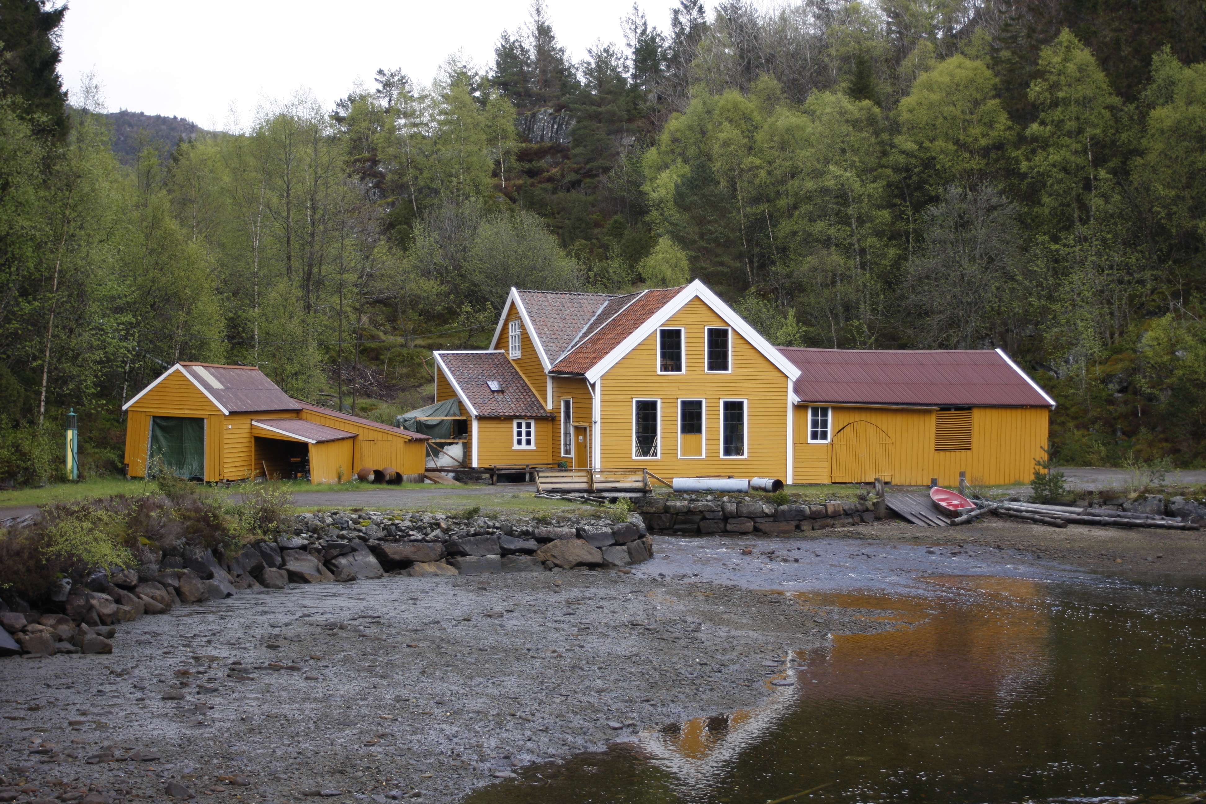 Sellevåg treskofabrikk. Foto: Ulf Ingmar Gustafsson. Fra Riksantikvarens Kulturminnesøk.